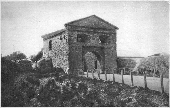 Okopy Świętej Trójcy - Brama Kamieniecka Кам'янецька брама в селі Окопи Тернопільської обл. (19 ст.)